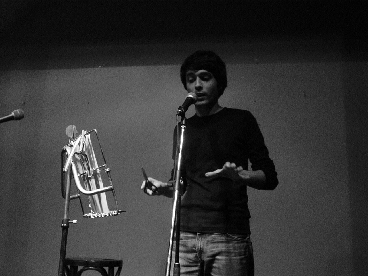 Poetes recitant a l'Horiginal de Barcelona el 2007